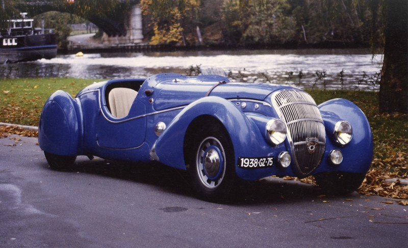 Peugeot 302 Sport Darl'Mat Roadster 1938 carrossée par Pourtout